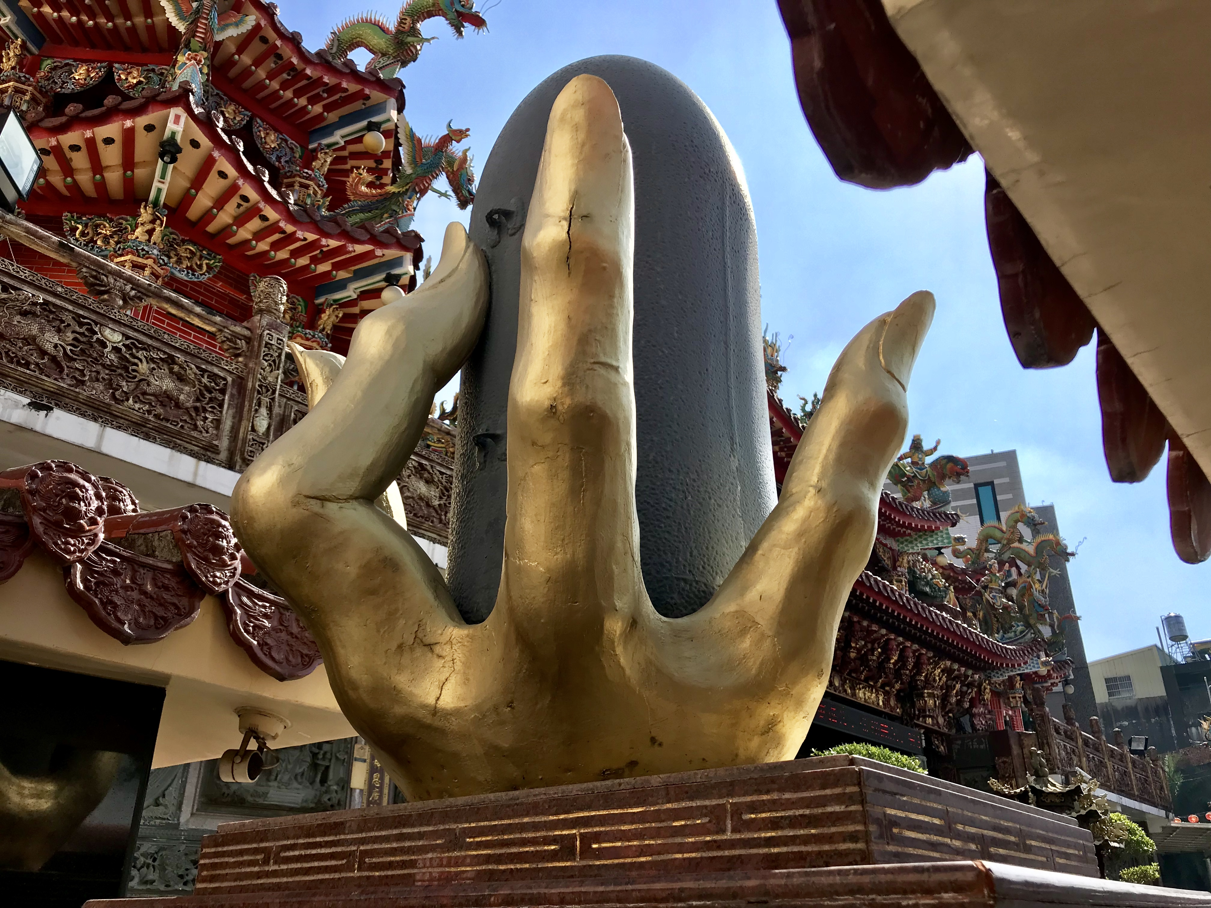 中文（台灣）: 萬丹鄉萬惠宮媽祖接炸彈塑像